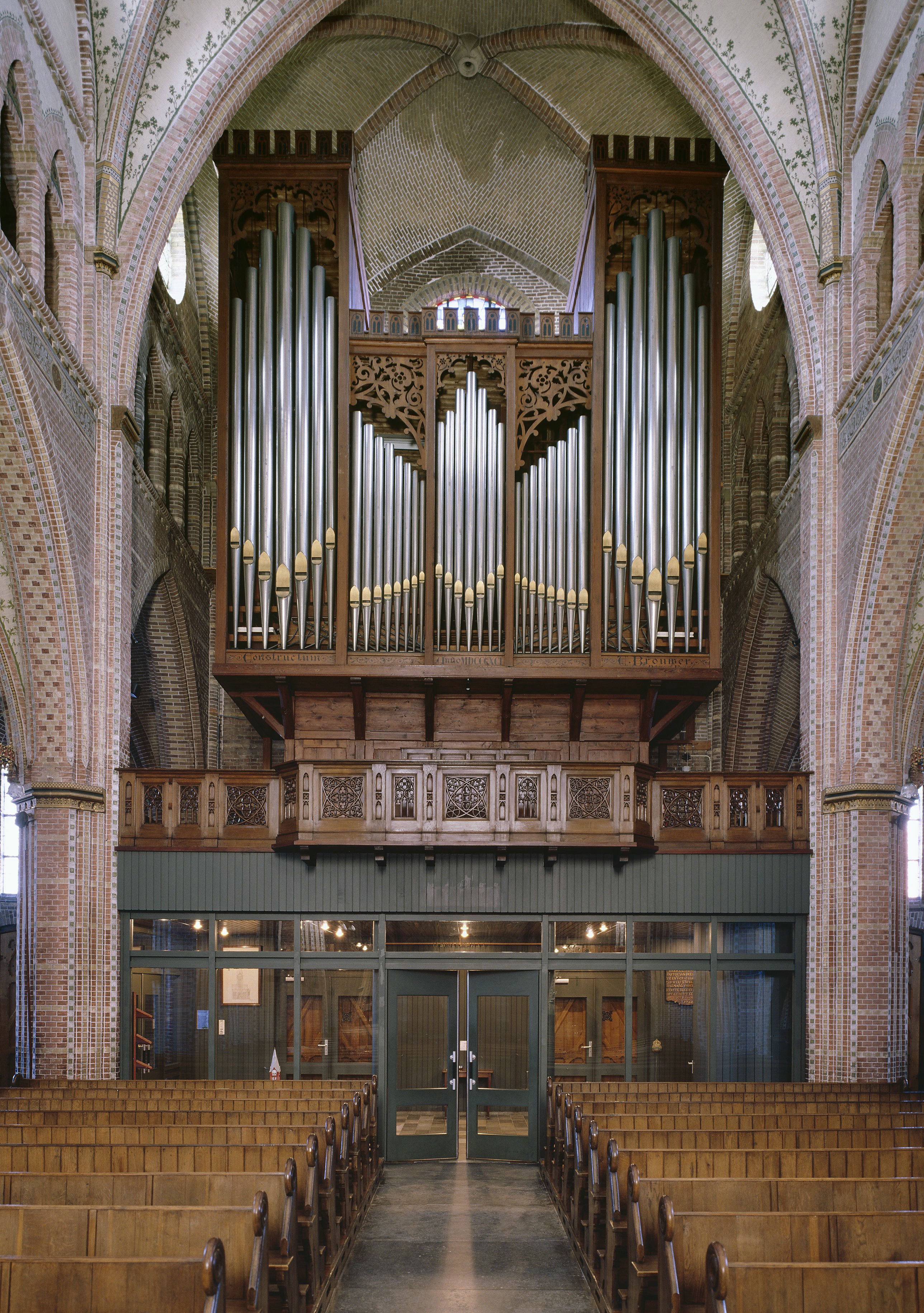 Rooms-katholieke Sint-Martinuskerk: Interieur, aanzicht orgel, orgelnummer 1378 (opmerking: Gefotografeerd voor Het Historische Orgel in Nederland 1886-1894, bladzijde 234)